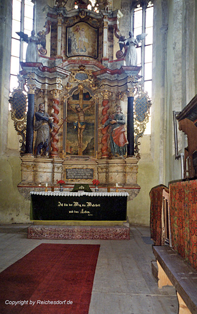 Kirchenaltar von Reichesdorf